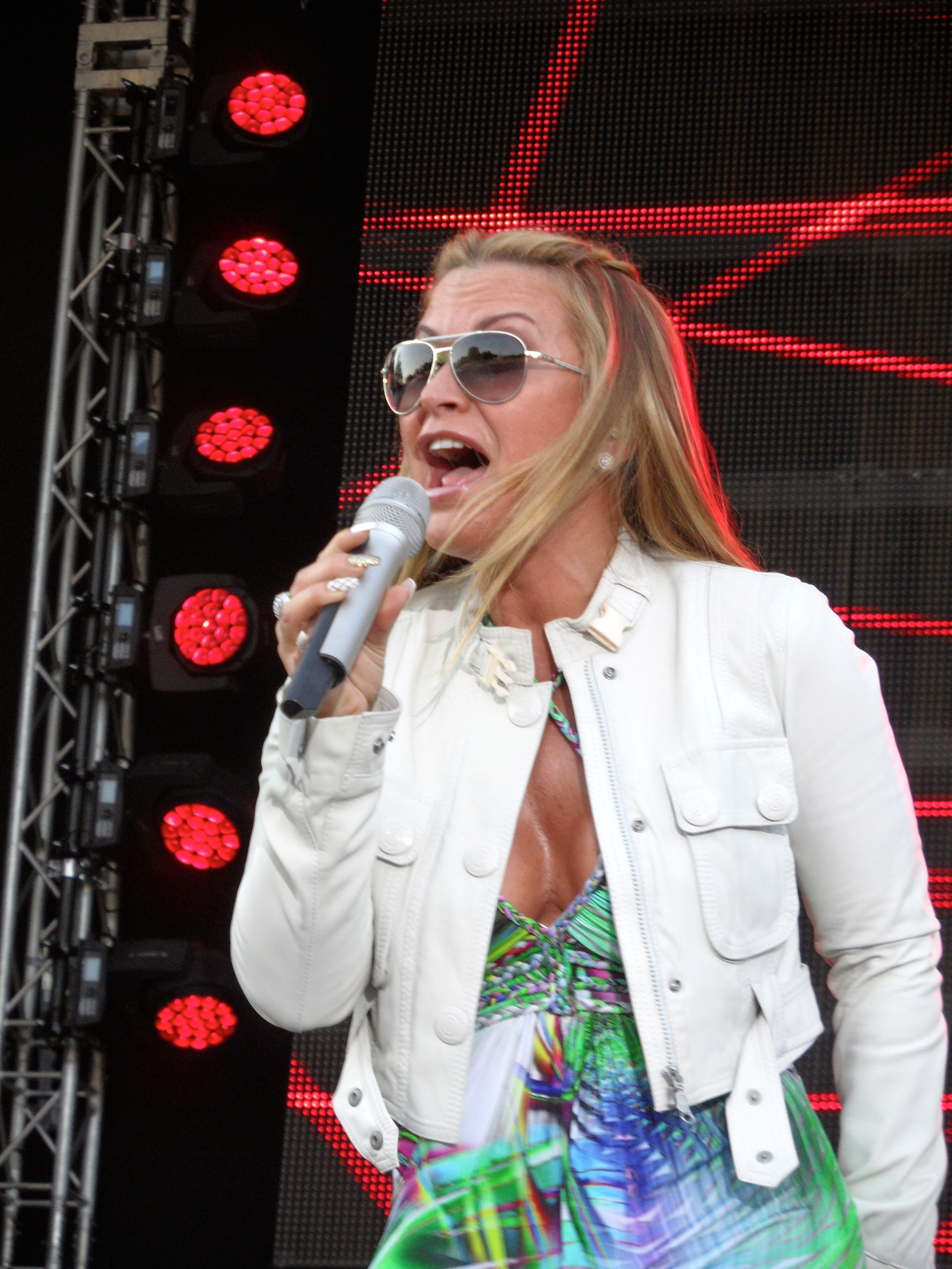 Anastacia bei stars@nrd2 in Vechta